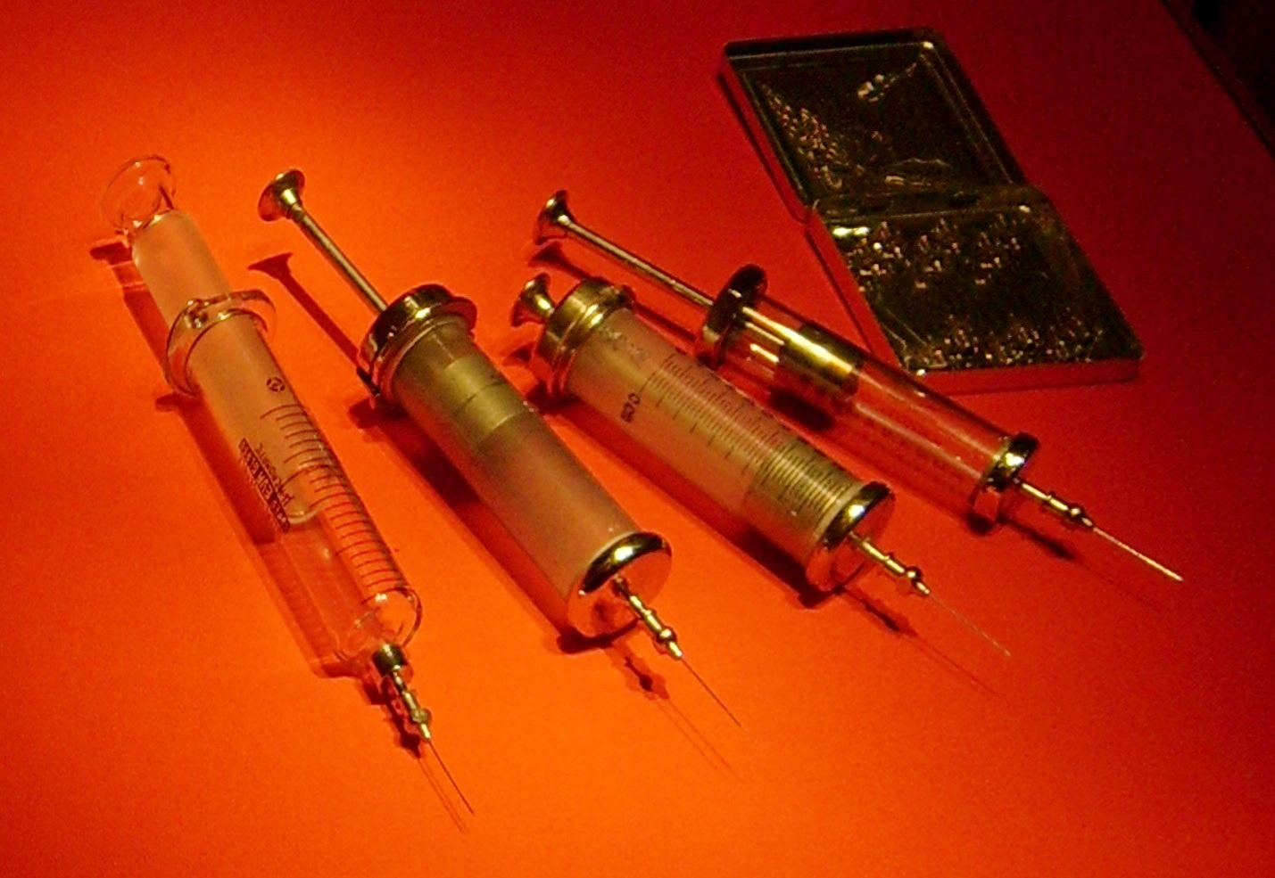 Historische Spritzen